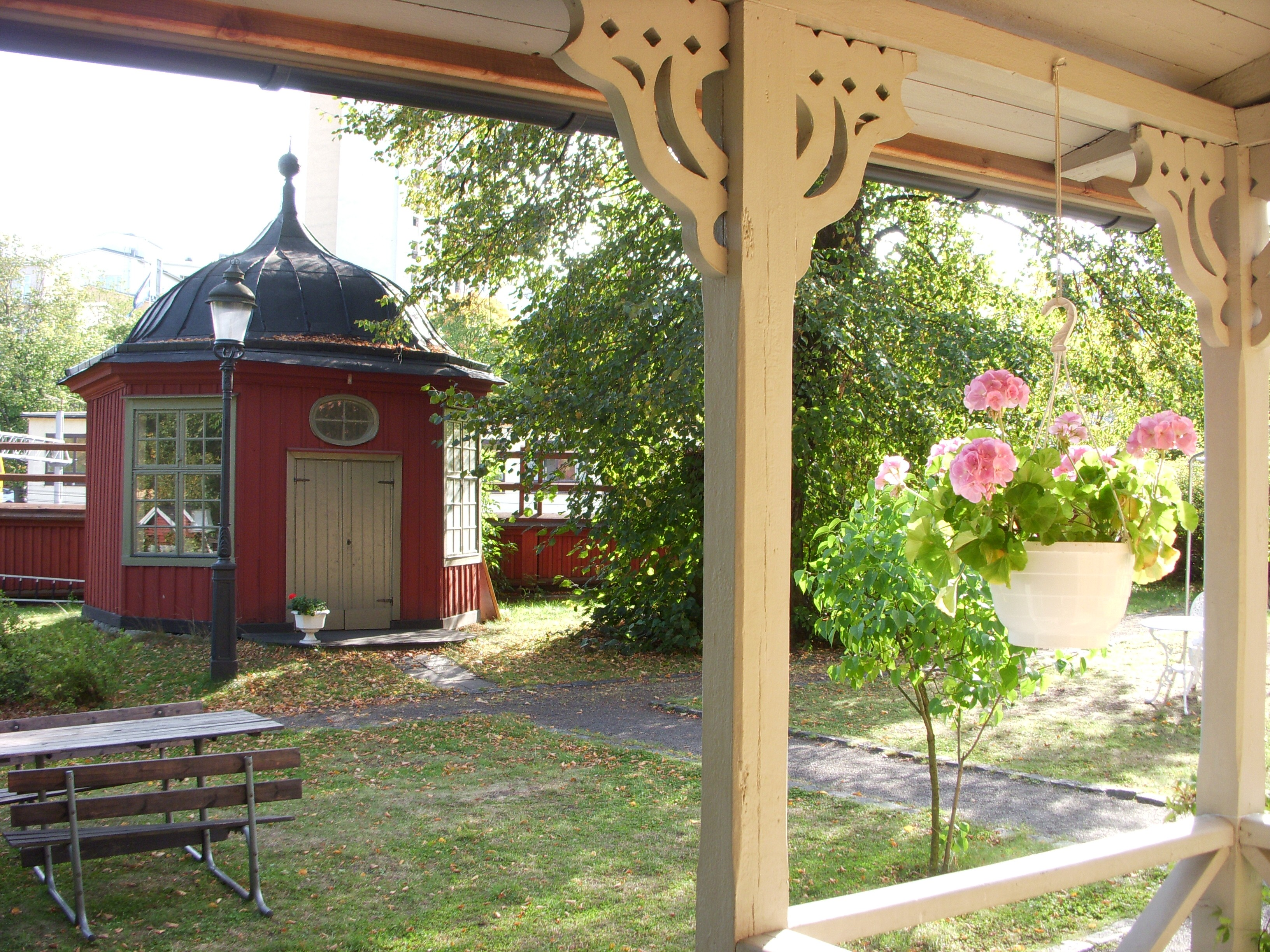 Ekermanska malmgårdens lusthus, Södermalm